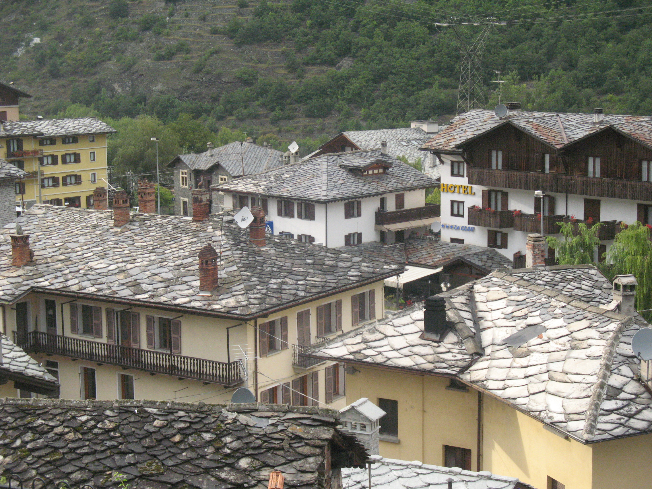 Восточная часть Арвье